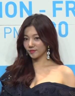 KBS 1TV 일일연속극 '여름아 부탁해' 제작발표회가 25일 오후 라마다 서울 신도림 그랜드볼룸에서 열렸다.